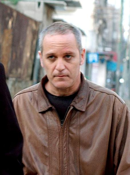 שרון אלכסנדר בתפקיד ברוך בסרט מפטיר